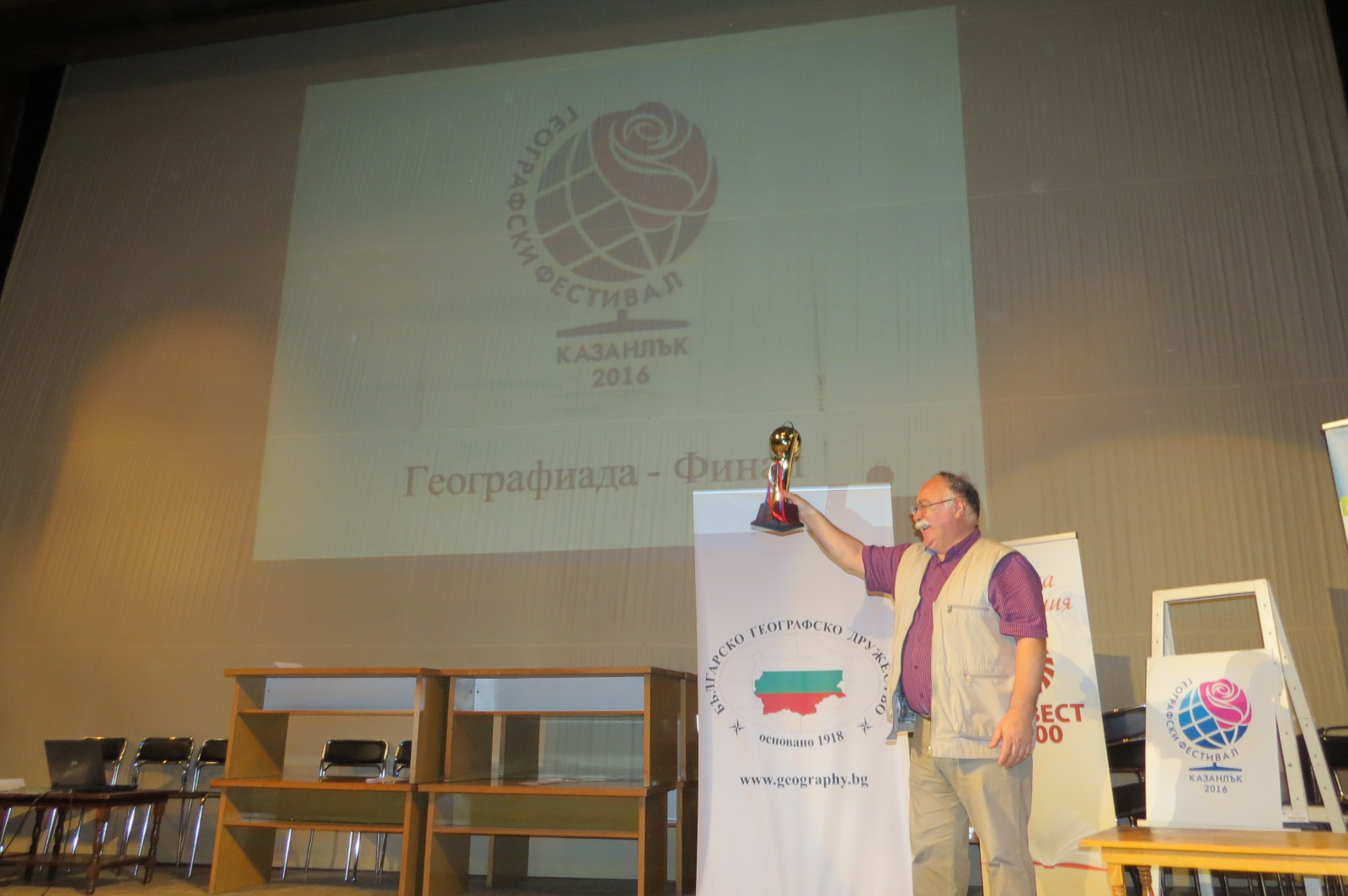 На Българсия географски фестивал в Казанлък 2016.